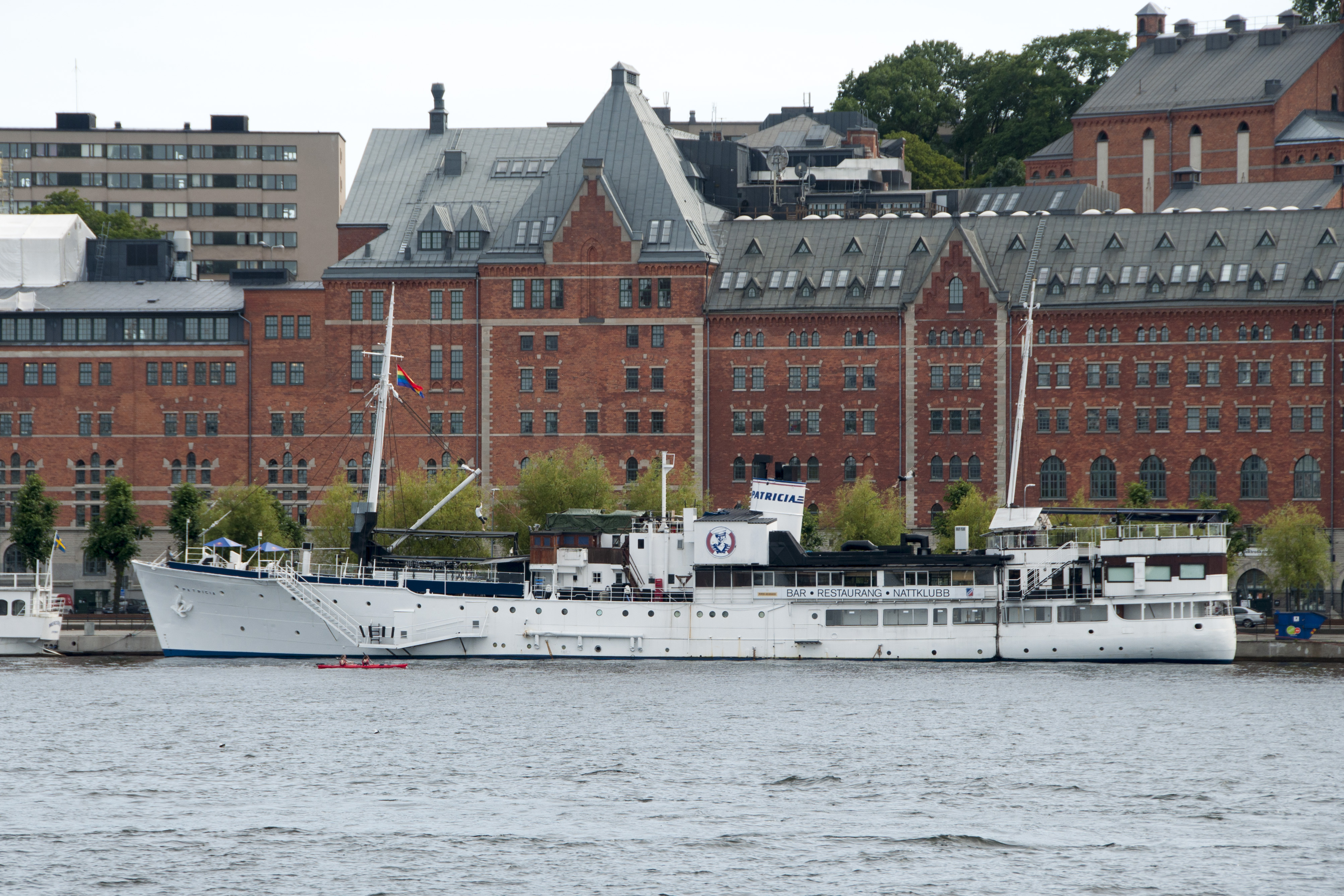 M/S Patricia